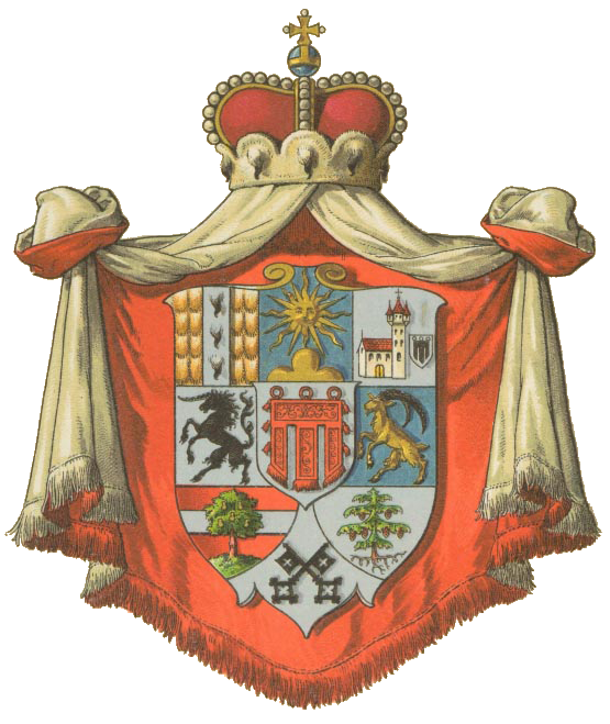 Wappen Vorarlbergs 1864 bis 1918.